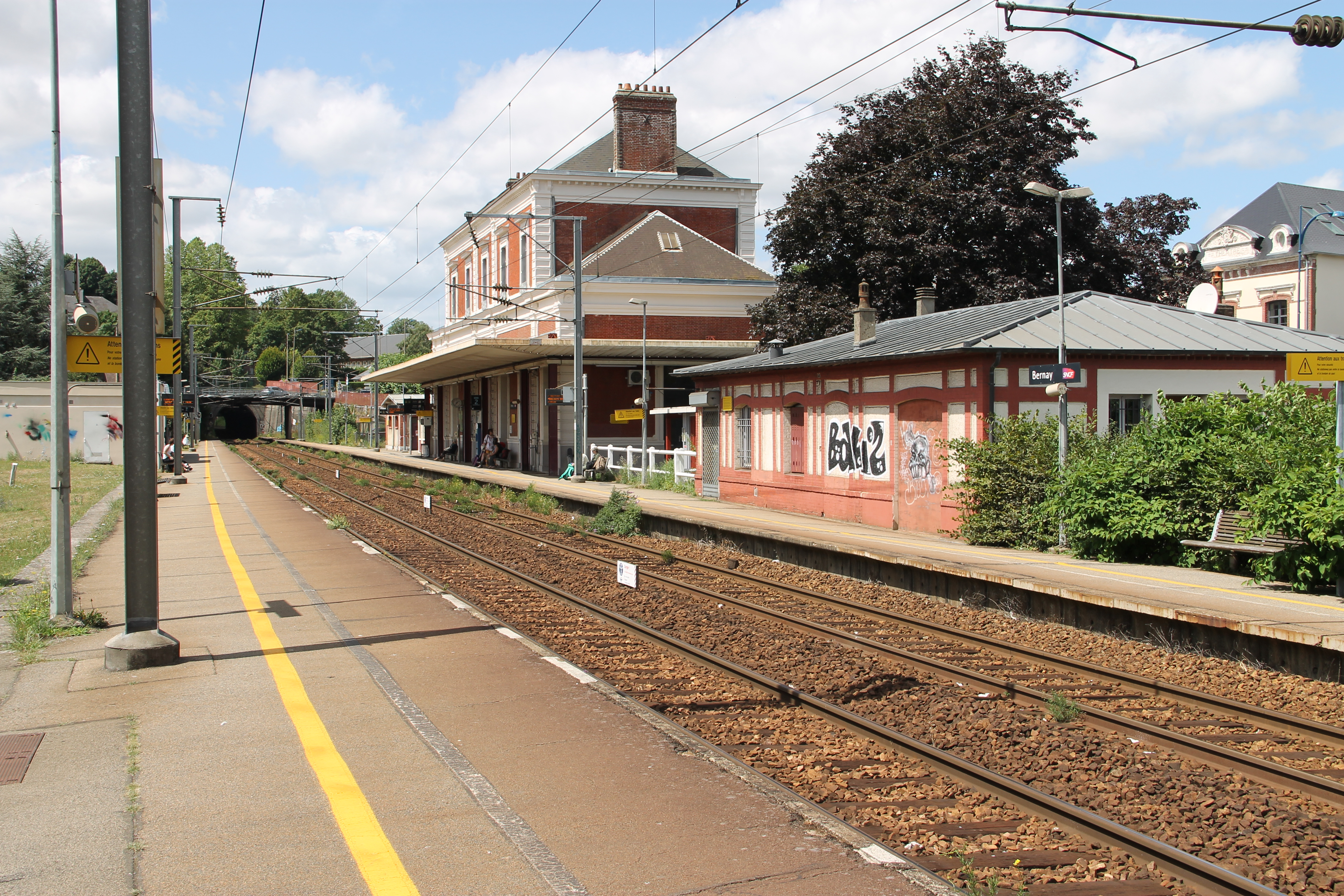 Bâtiment voyageurs et quais de la gare de Bernay, département de l'Eure, France.